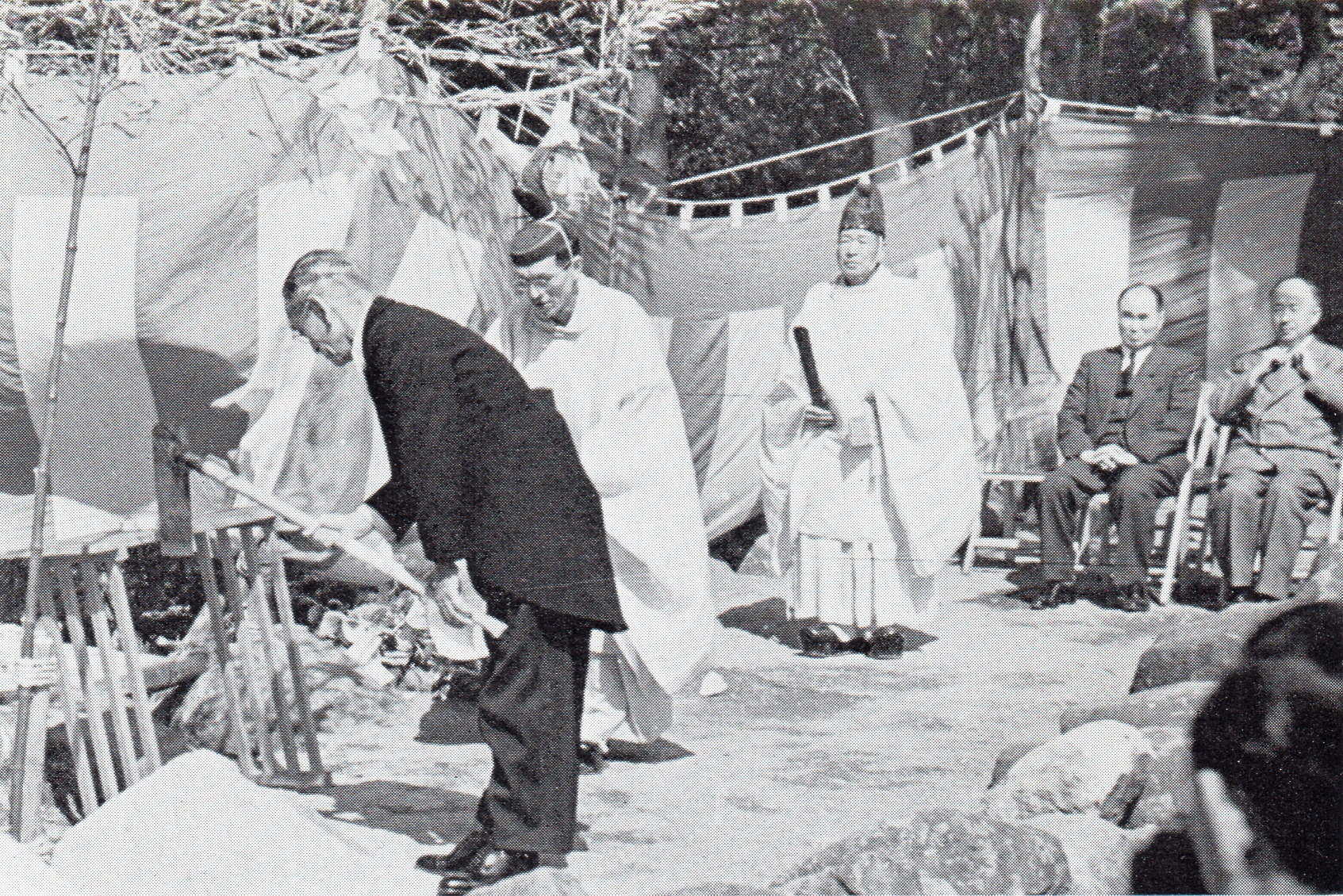 岡崎城復元工事起工式（1958年4月）